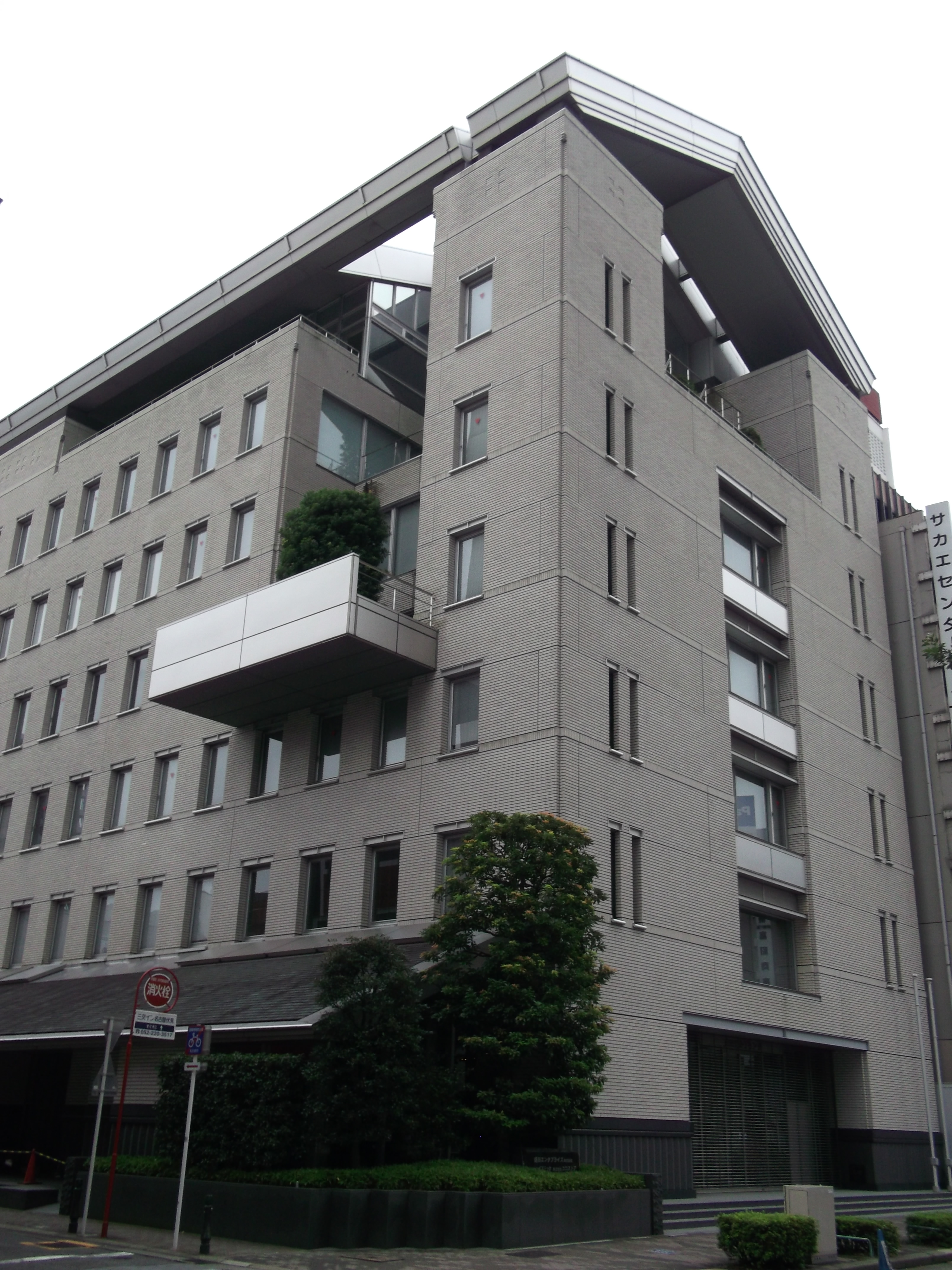 名古屋市中区栄の盛田ビルディングを西側公道北側より撮影